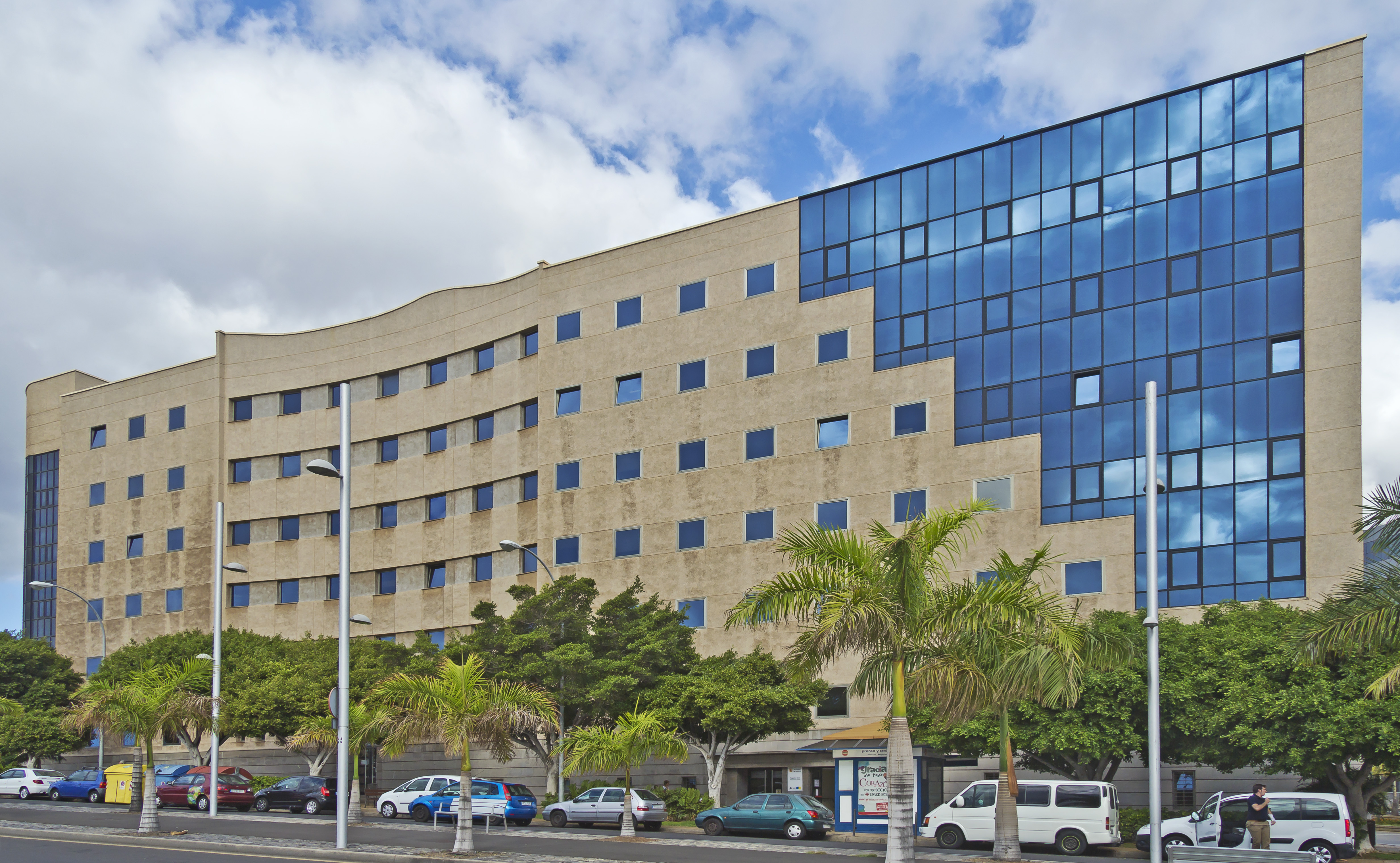 Palacio de Justicia an der Avenida Tres de Mayo in Santa Cruz de Tenerife